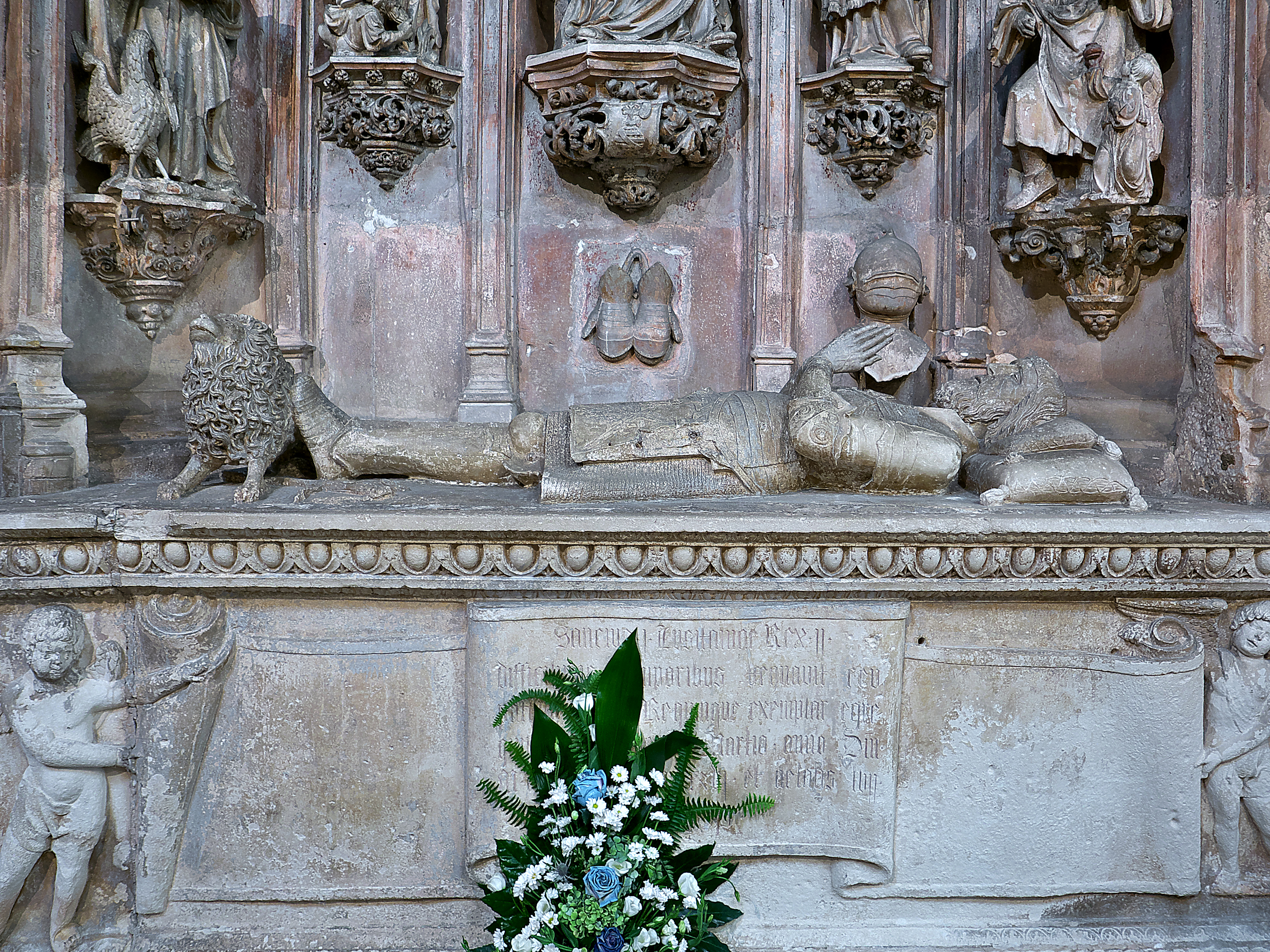 Monasterio de Santa Cruz, Coimbra. Sepulcro de Sancho I de Portugal (†1211) en el presibeteiro de la iglesia monacal, Nicolás Chanterenne (1518-1522)